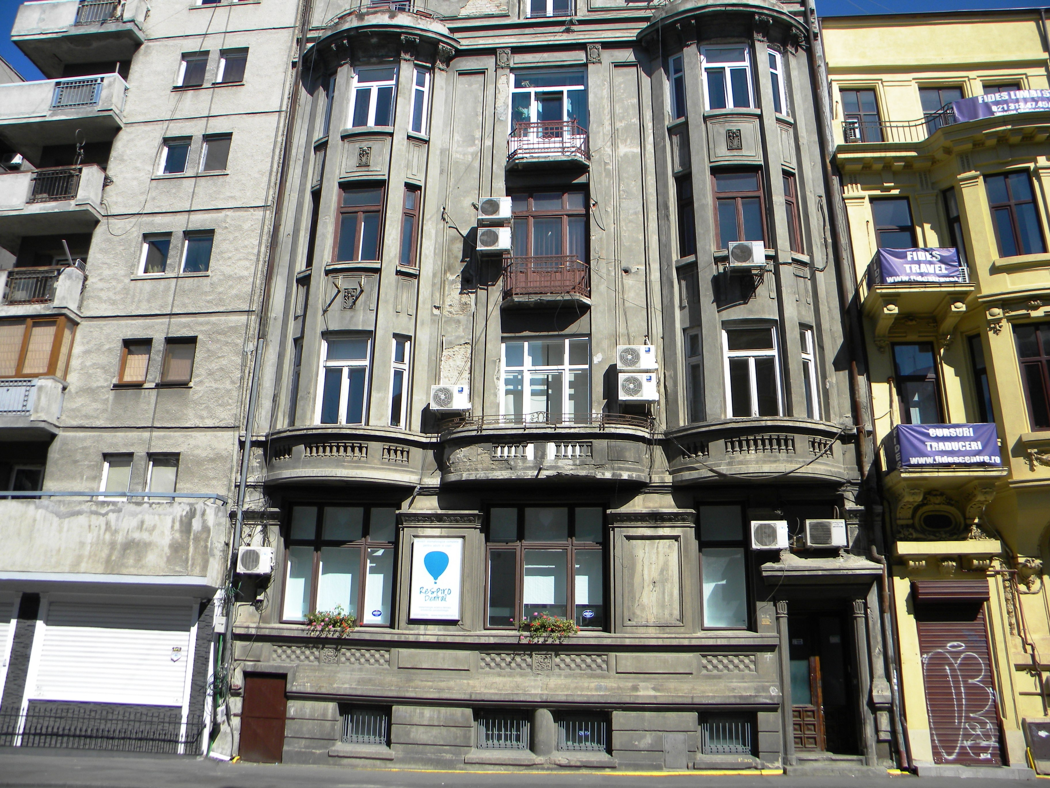 Bucuresti, Romania, Strada Hristo Botev nr. 7 (imobil) sect. 3